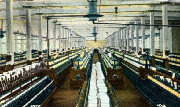 inside a cotton mill